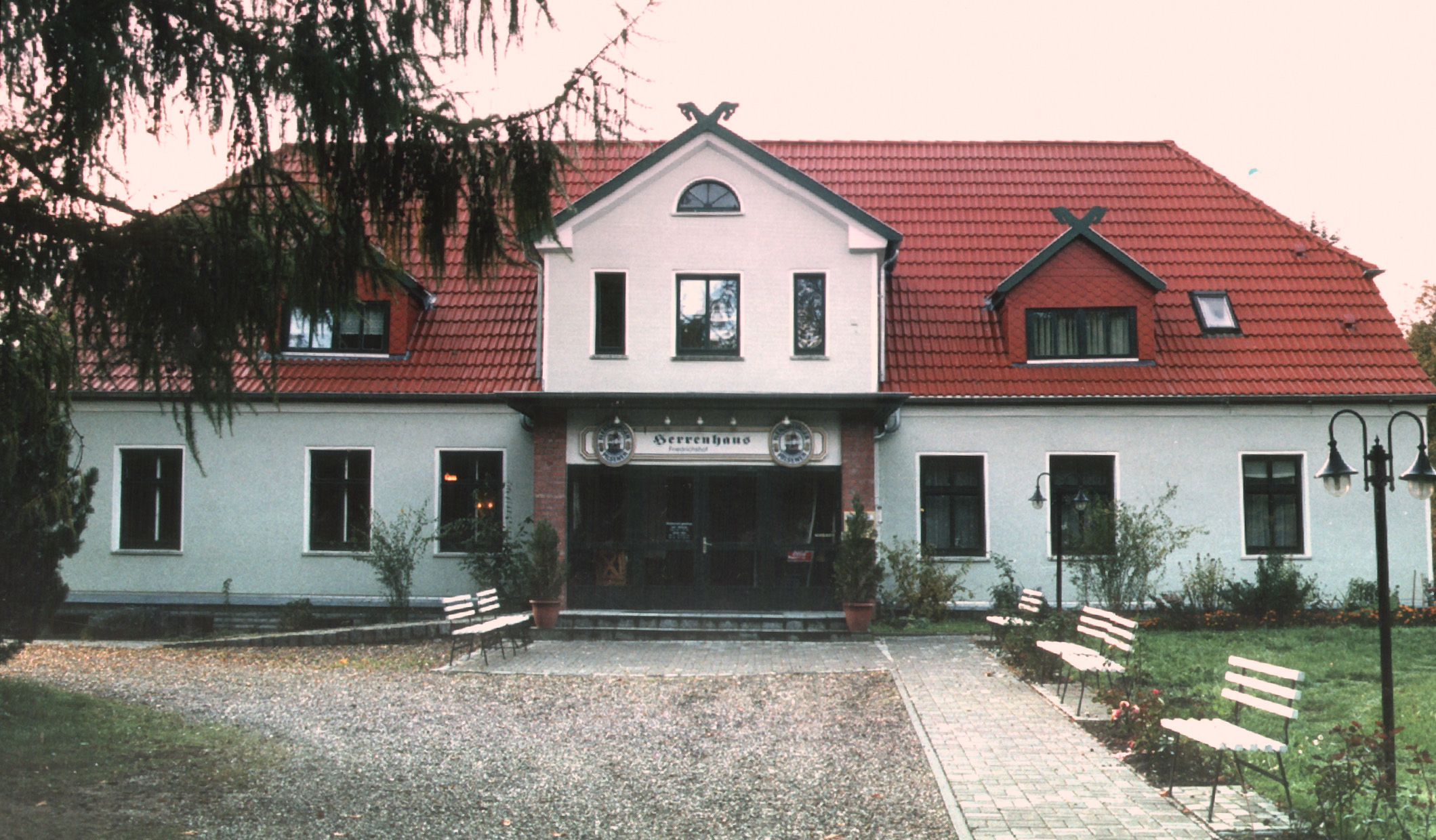 Herrenhaus Friedrichshof bei Schwaan Datum: 19.10.2003 Urheber: Michael Pfeiffer Quelle: Privates Fotoalbum der eigenen Familie